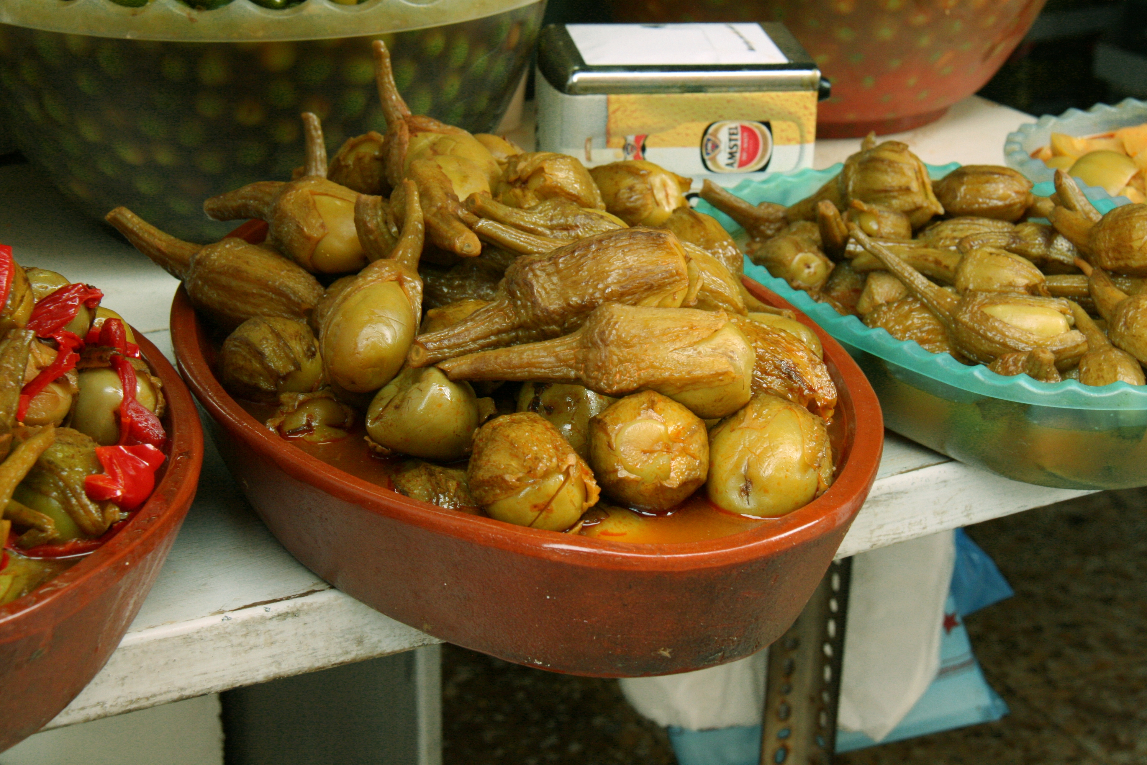 Berenjenas de Almagro simples